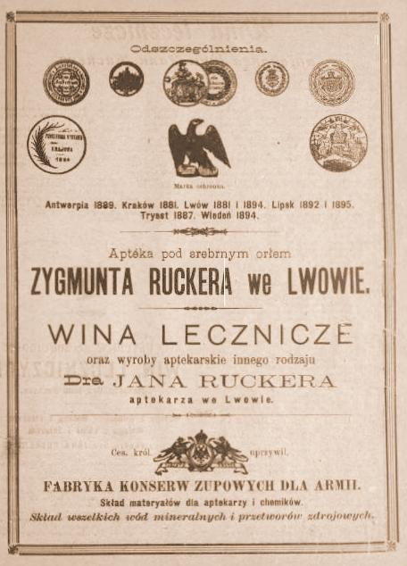 Reklama Jana i Zygmunta Ruckerów w Kalendarzu Macierzy Polskiej na rok pański 1898